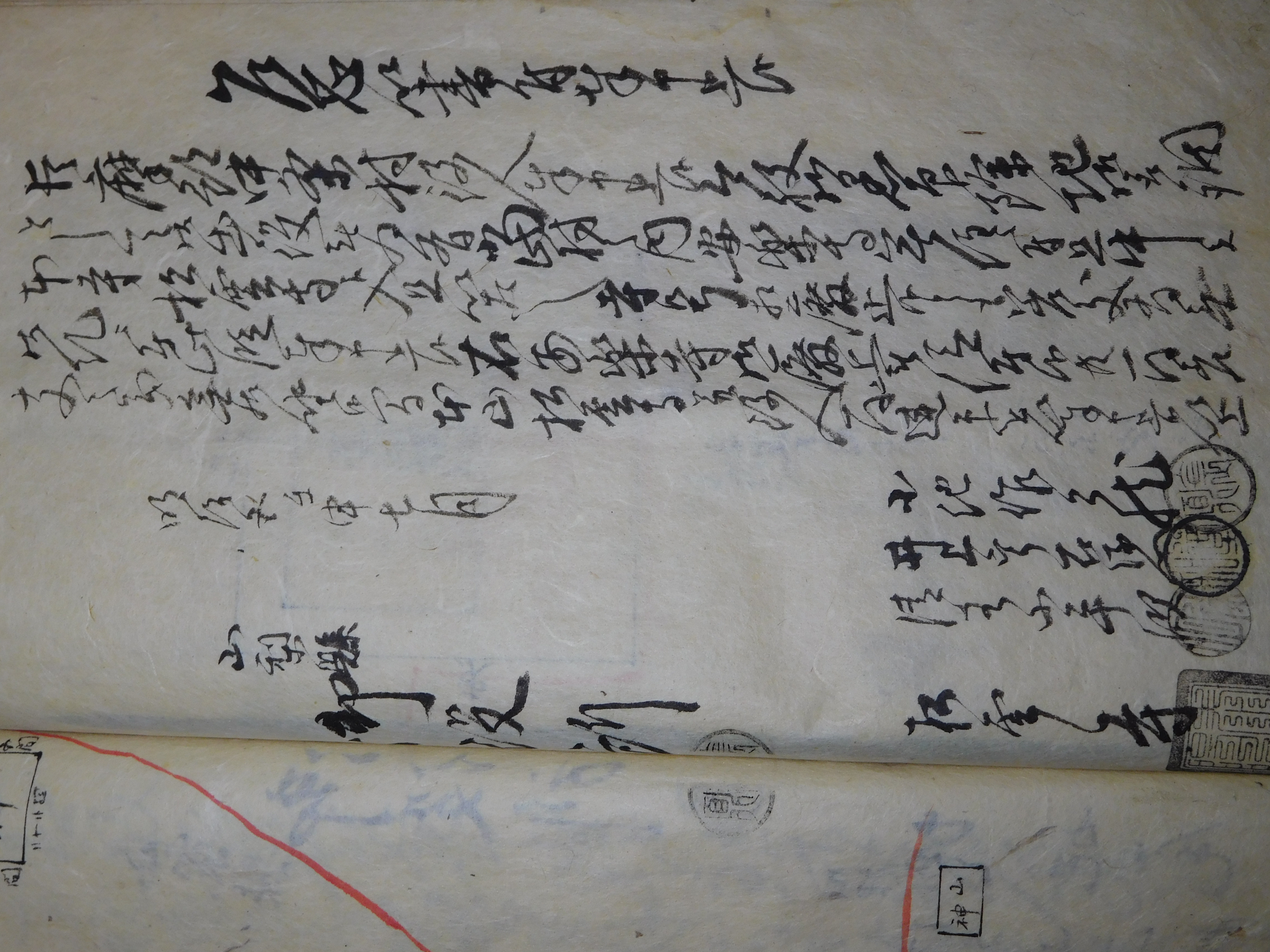 阿弥陀堂説明